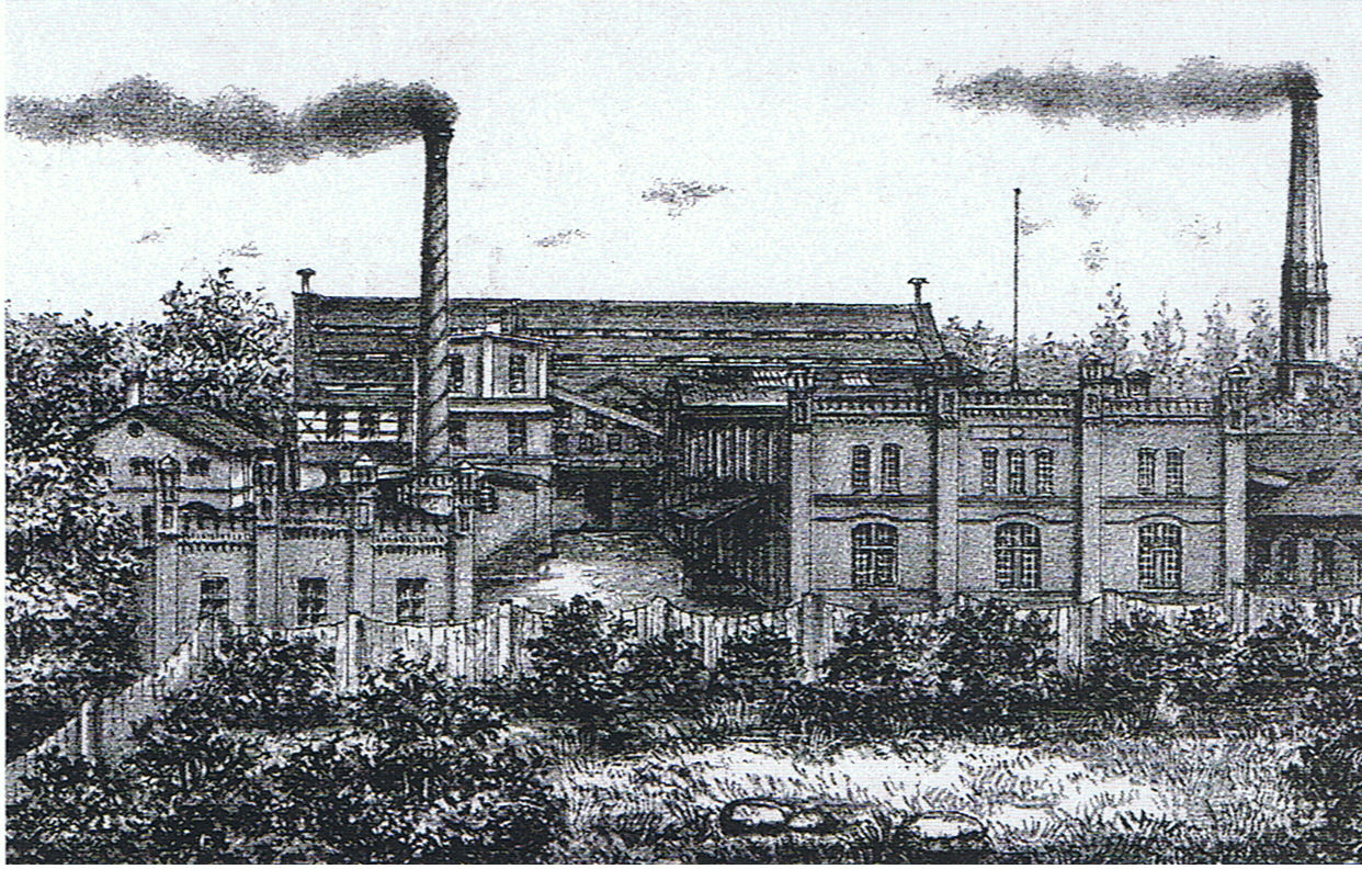 Papiernia w Szczecinie Strudze (widok z 1901 r.)